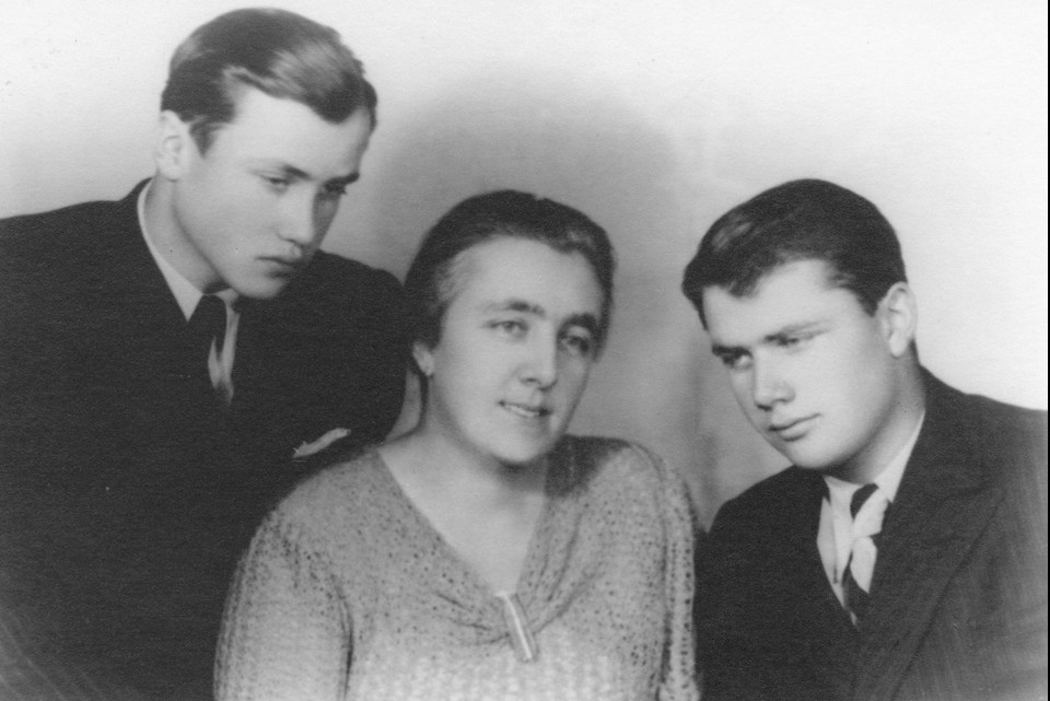 Marie Moravcová (* 1898 - 1942) s oběma syny (vlevo Vlastimil Moravec, vpravo Miroslav Moravec) na fotografii datované před druhou světovou válku. Autor fotografie není znám. Marie Moravcová, rozená Krčilová, známá též jako "teta Moravcová", byla česká odbojářka, která spolu s ostatními čelny rodiny Moravcových významně pomáhala parašutistům při atentátu na Reinharda Heydricha. Vlastimil Moravec (* 1921 - 1942) absolvovent obchodního gymnázia. Přezdívaný "Aťa". Zařizoval pro parašutisty kurýrní spojení a podílel se i na přípravě atentátu. Dne 26. dubna 1942 dostal od Vlastimila Moravce parašutista Jozef Gabčík jízdní kolo, které bylo při atentátu použito. V den zátahu na byt rodiny Moravcových (17. června 1942) nebyl Vlastimil v Praze. Gestapo jej domů přivolalo fingovaným telegramem. Po zatčení byl Vlastimil na gestapu mučen a zřejmě to byl on, kdo prozradil místo úkrytu parašutistů - kostel v Resslově ulici. Byl popraven v koncentračním táboře Mauthausen dne 24. října 1942. Miroslav Moravec (* 1918 - 1944) původním povolnáním automechanik v leteckých dílnách v Čakovicích. V roce 1939 odešel mimo republiku do československé zahraniční armády. Dne 14. února 1940 byl odveden v Marseille (Francie) - osobní číslo Z; F-2139; RAF/787609. Od 5. října 1943 pak byl zařazen jako pilot. Létal v 310. československé stíhací peruti RAF. Zahynul jako stíhací letec (v hodnosti rotný) v Anglii ráno dne 7. června 1944 při havárii svého Spitfiru (Spitfire LF Mk. IX., imatrikulace NN-M, číslo MJ906) na letišti Appledram (u Chichesteru) krátce po startu k operačnímu letu ke krytí invazního předmostí v Normandii. Je pohřben v Chichesteru ve Velké Británii (Chichester City Cemetery, Square 159, hrob č. 159-E-5).